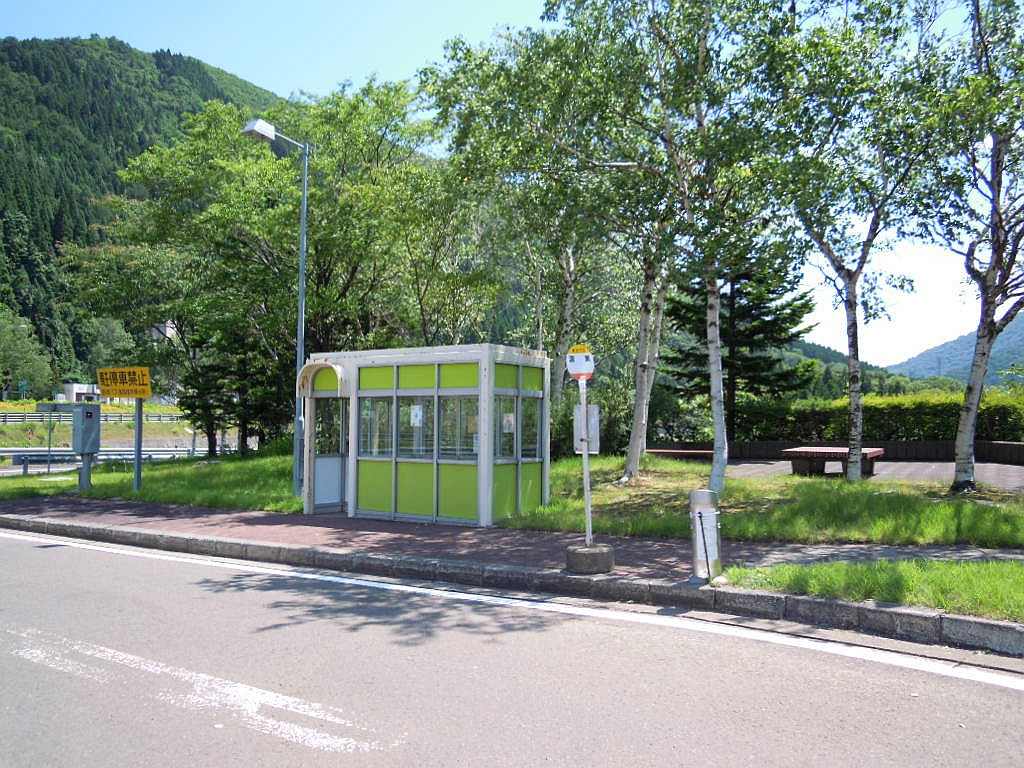 東北自動車道湯瀬パーキングエリアに設置されている湯瀬バスストップ（下り線側）